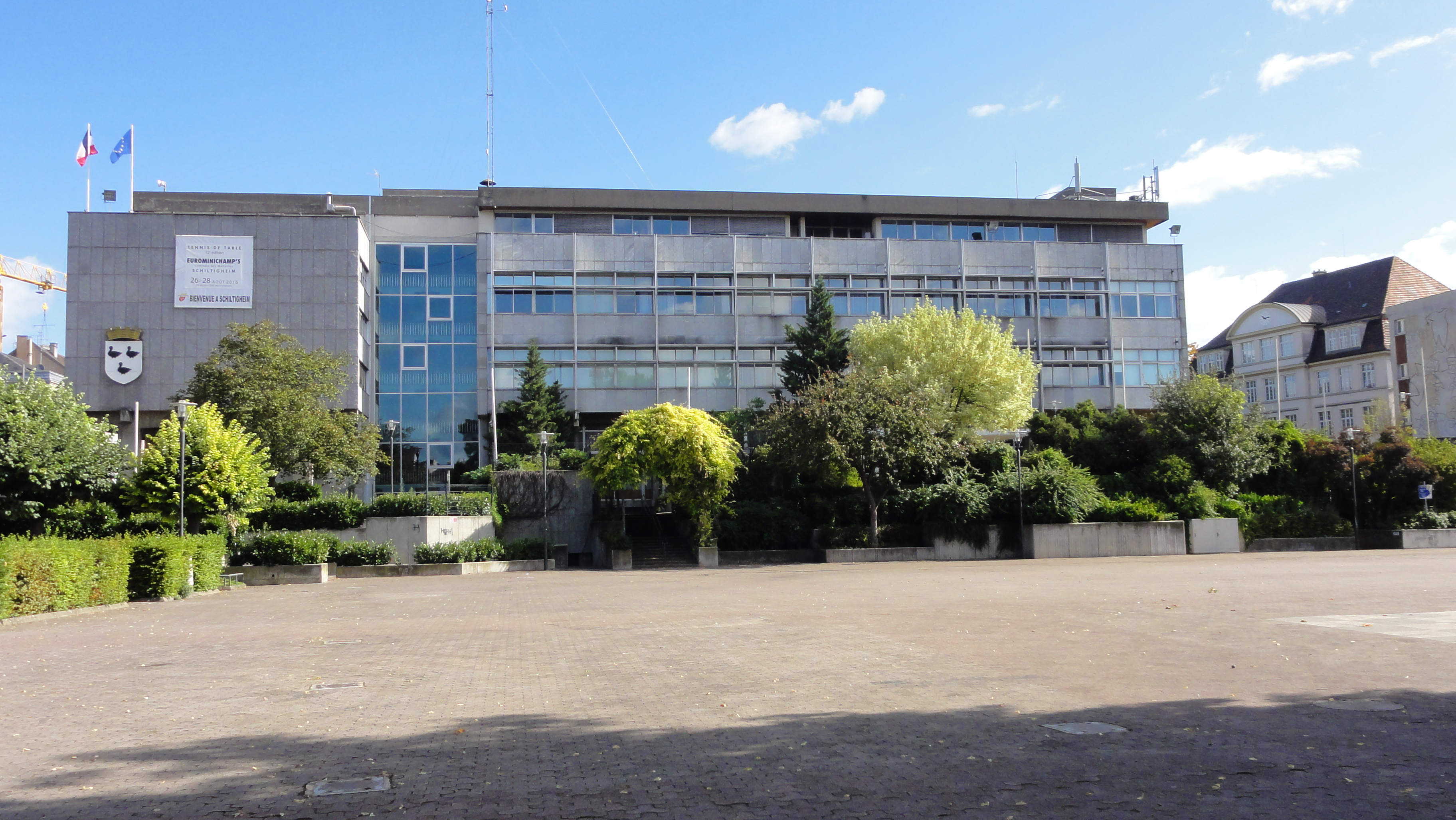 Alsace, Bas-Rhin, Schiltigheim, Hôtel de Ville (1969), 110 route de Bischwiller. .